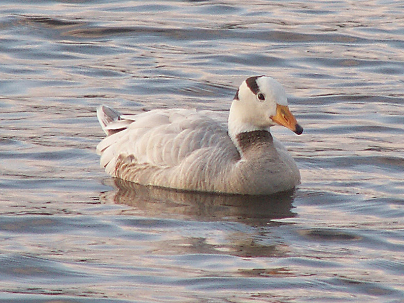 En Stripgås